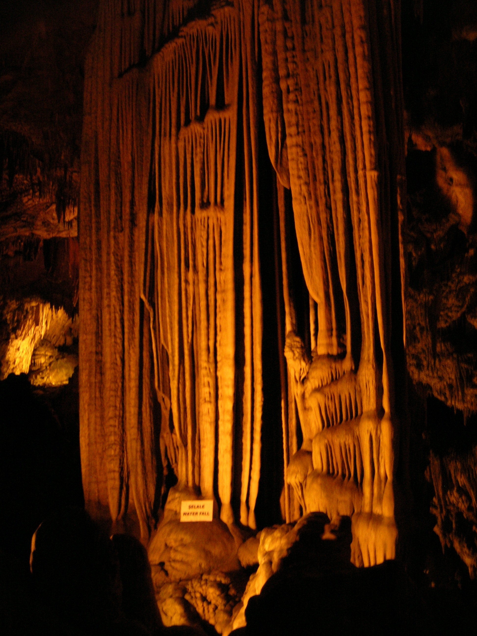 Der so genannte Wasserfall.